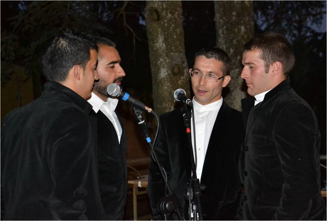 Tenore Sa Niera, formazione di canto a tenore composta da Giovannino Becciu ('oghe), Michele Demelas e Andrea Regaglia (basciu), Gian Mario Ogana (contra) e Salvatore Virdis (mesa 'oghe).